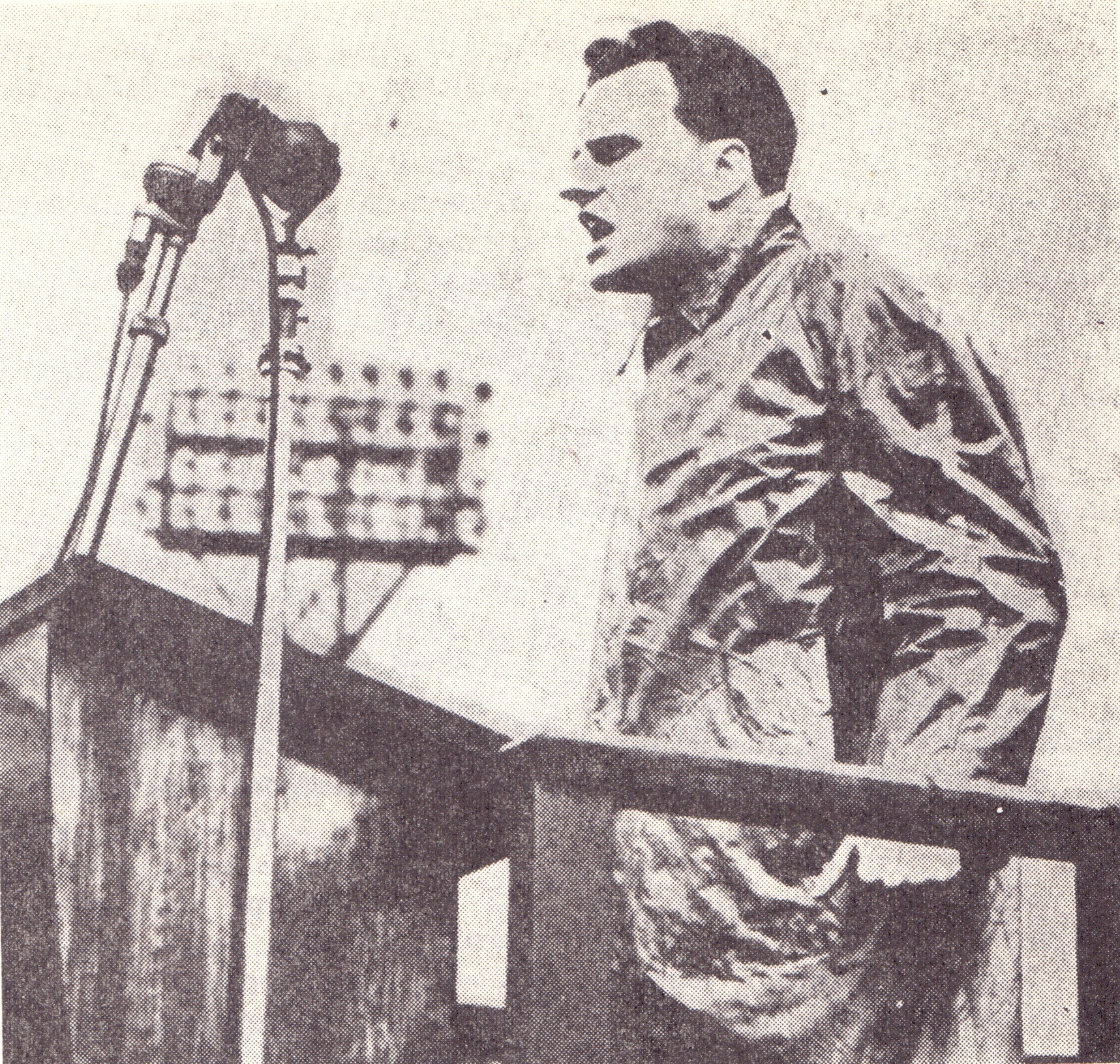 Billy Graham London 1954 "Chrześcijanin" 1971 nr 11-12 s 11